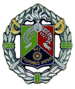 Insigne régimentaire du 1er Régiment étranger de cavalerie